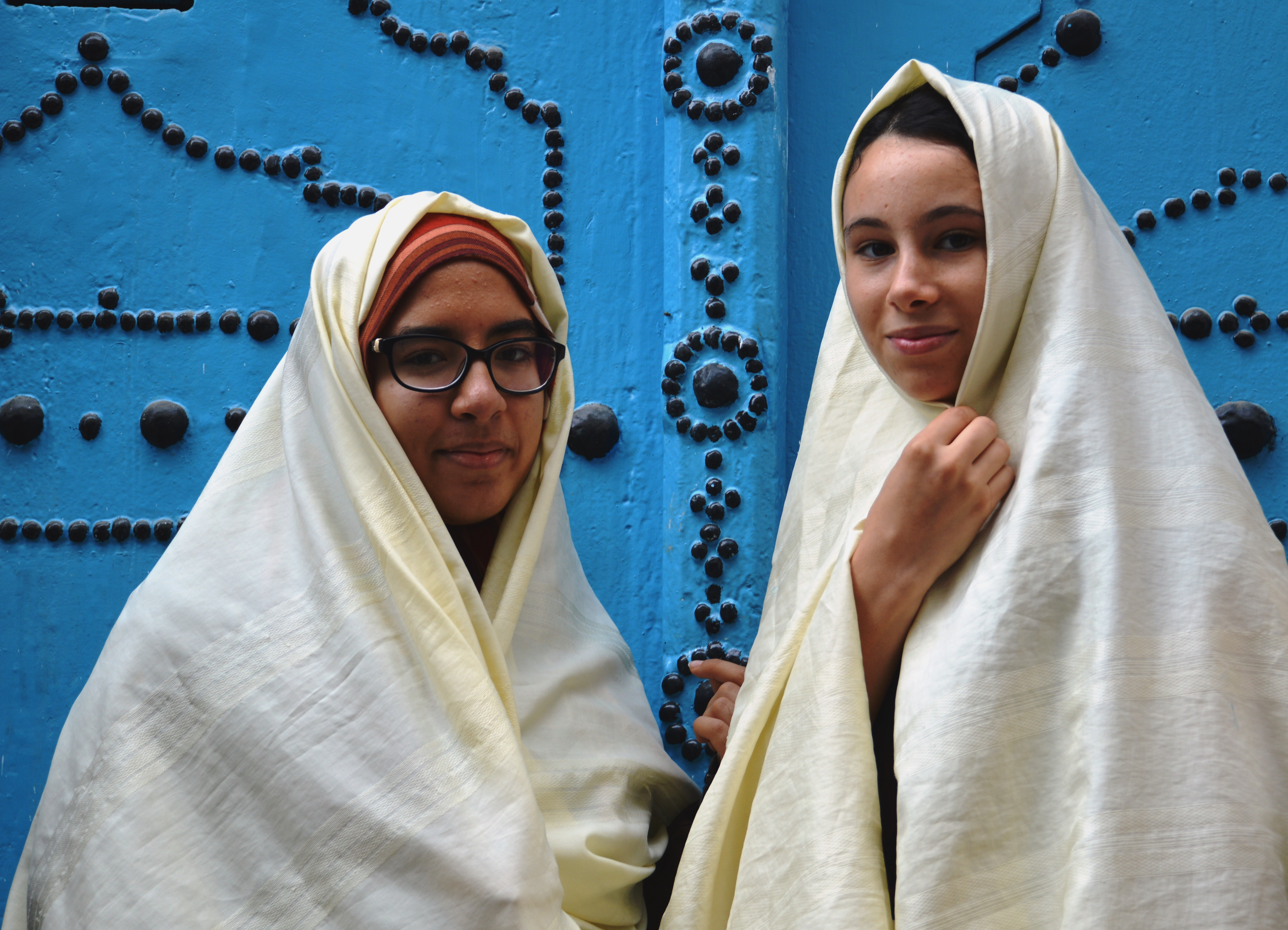 Jeunes femmes portant un sefseri This is an image of Cultural Fashion or Adornment from Tunisia